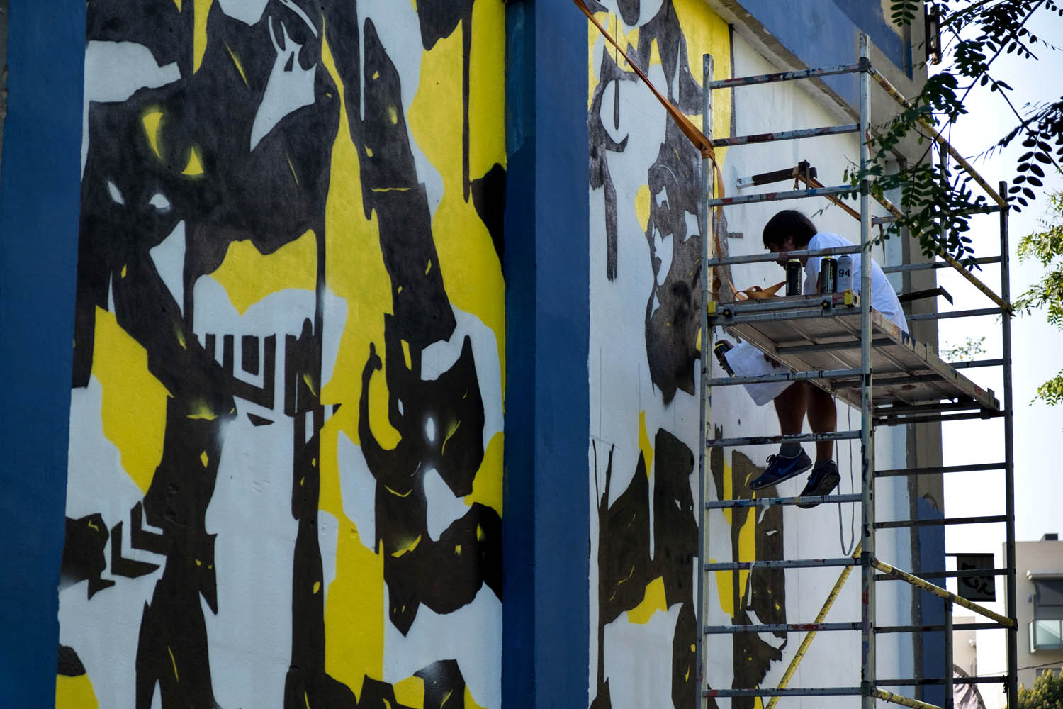 El artista Fasim trabajando en el gran mural en el Festival de Open Walls Conference de Barcelona en el año 2016 en la Nau Bostik.